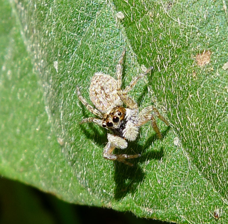 Jumping Spider . Salticidae. Menemerus semilimbatus.